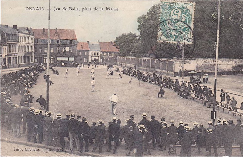 carte postale ancienne de Denain prise place de la mairie, actuellement appelée Place Wilson lors d’un match de jeu de balle - fichier déposé par Utilisateur:Mariano le 26 juillet 2013 à 13:59 sur .